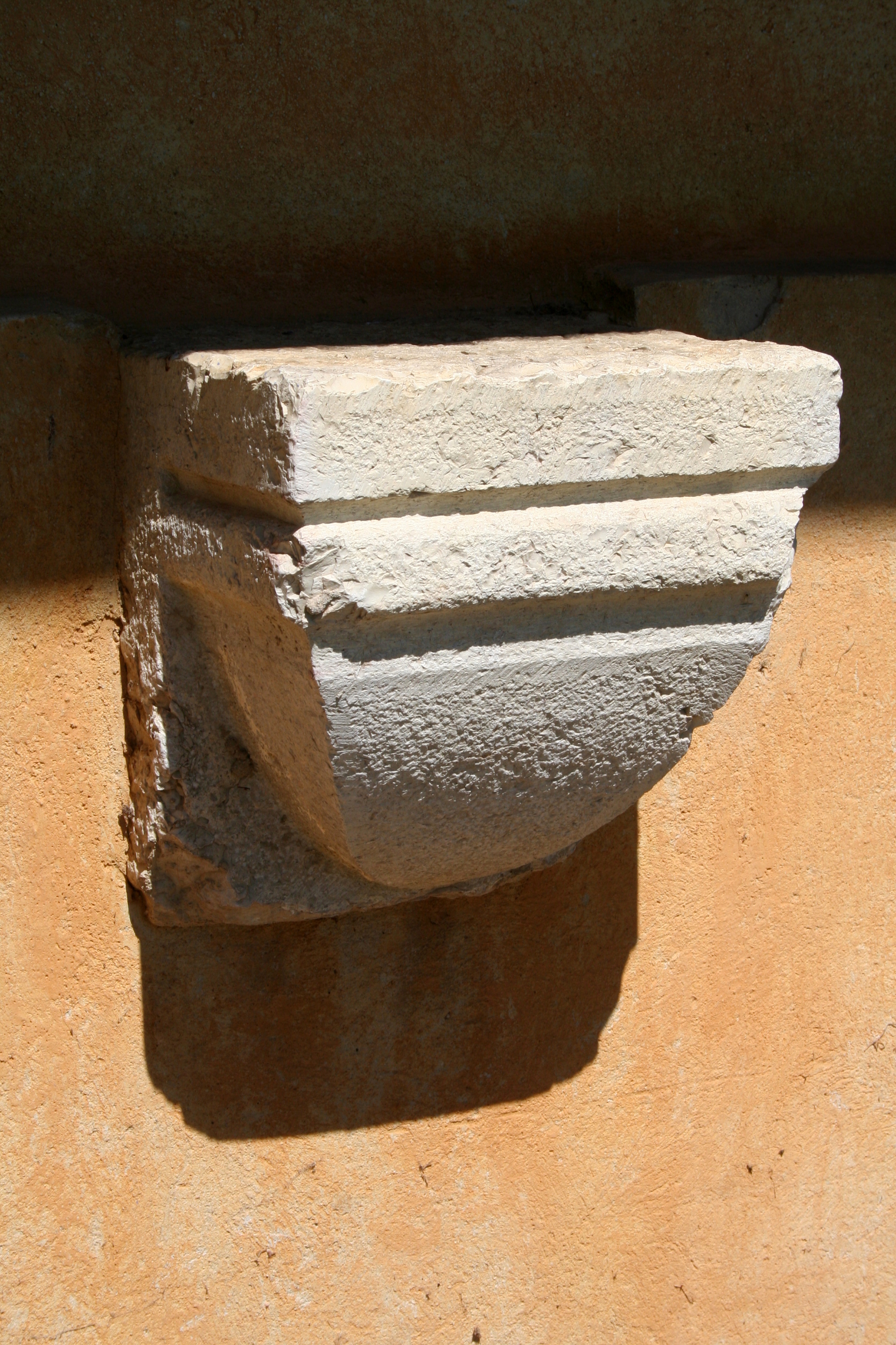 Détail d'un chapiteau à Monte au Lever.